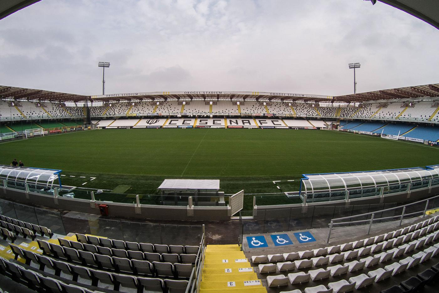 Intera visuale stadio